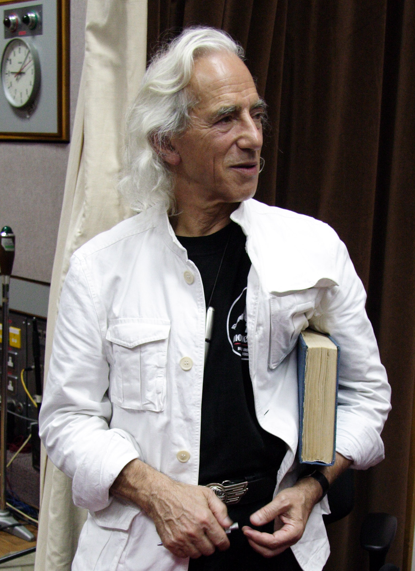 Sewa Nowgorodzew, 2006. == Permission ==